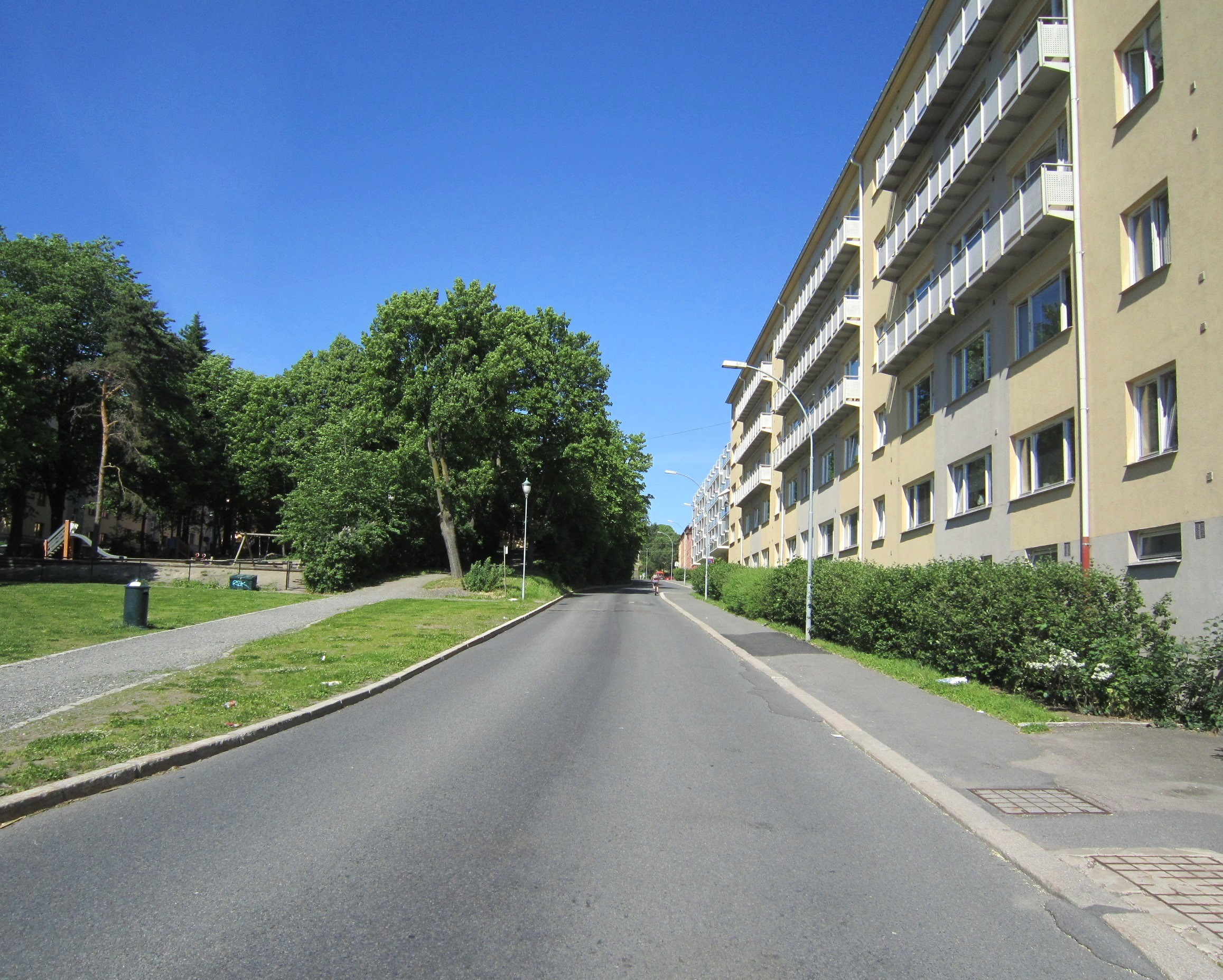 Ole Bulls gate på Torshov i Oslo